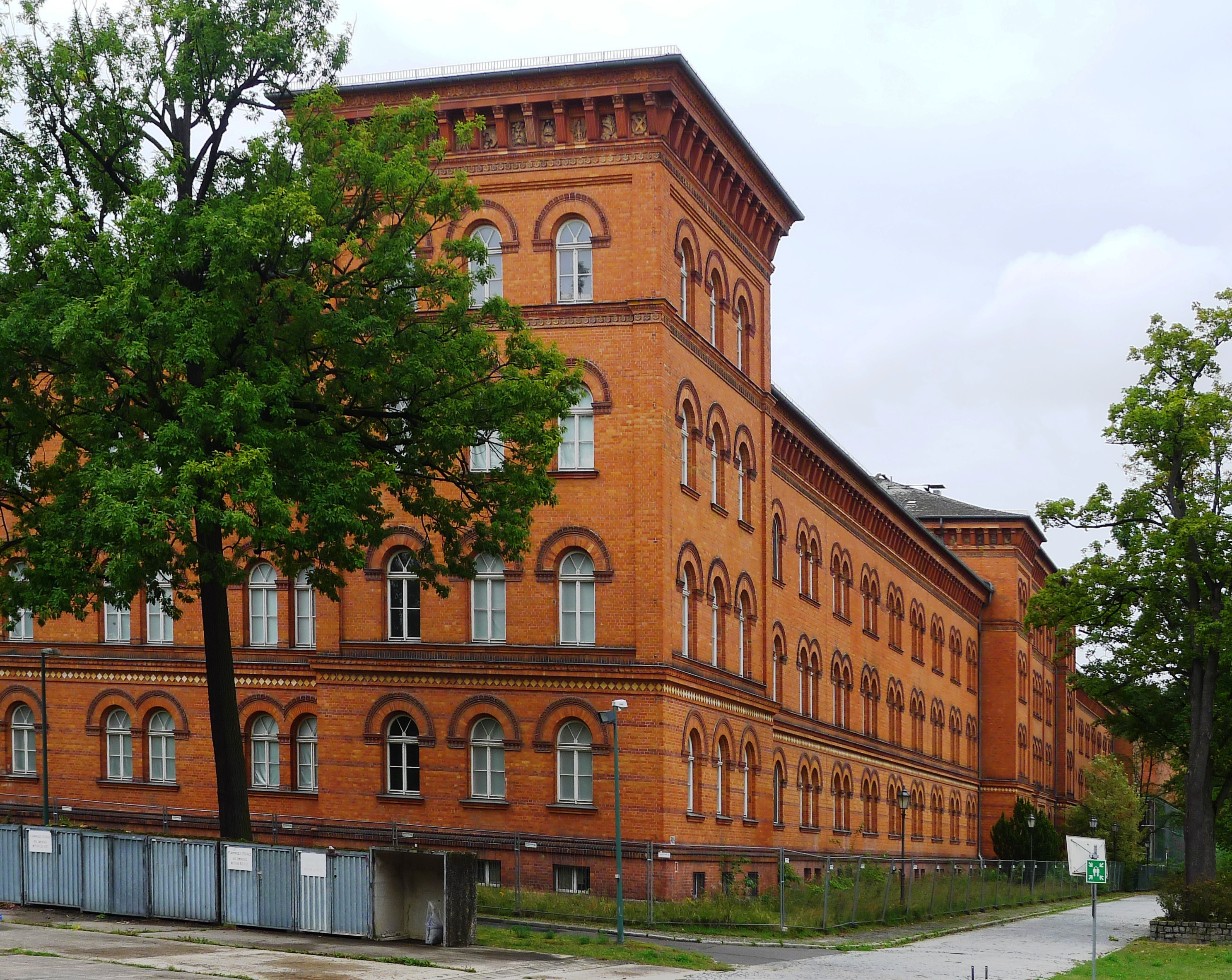 ehemaliges Kasernengebäude